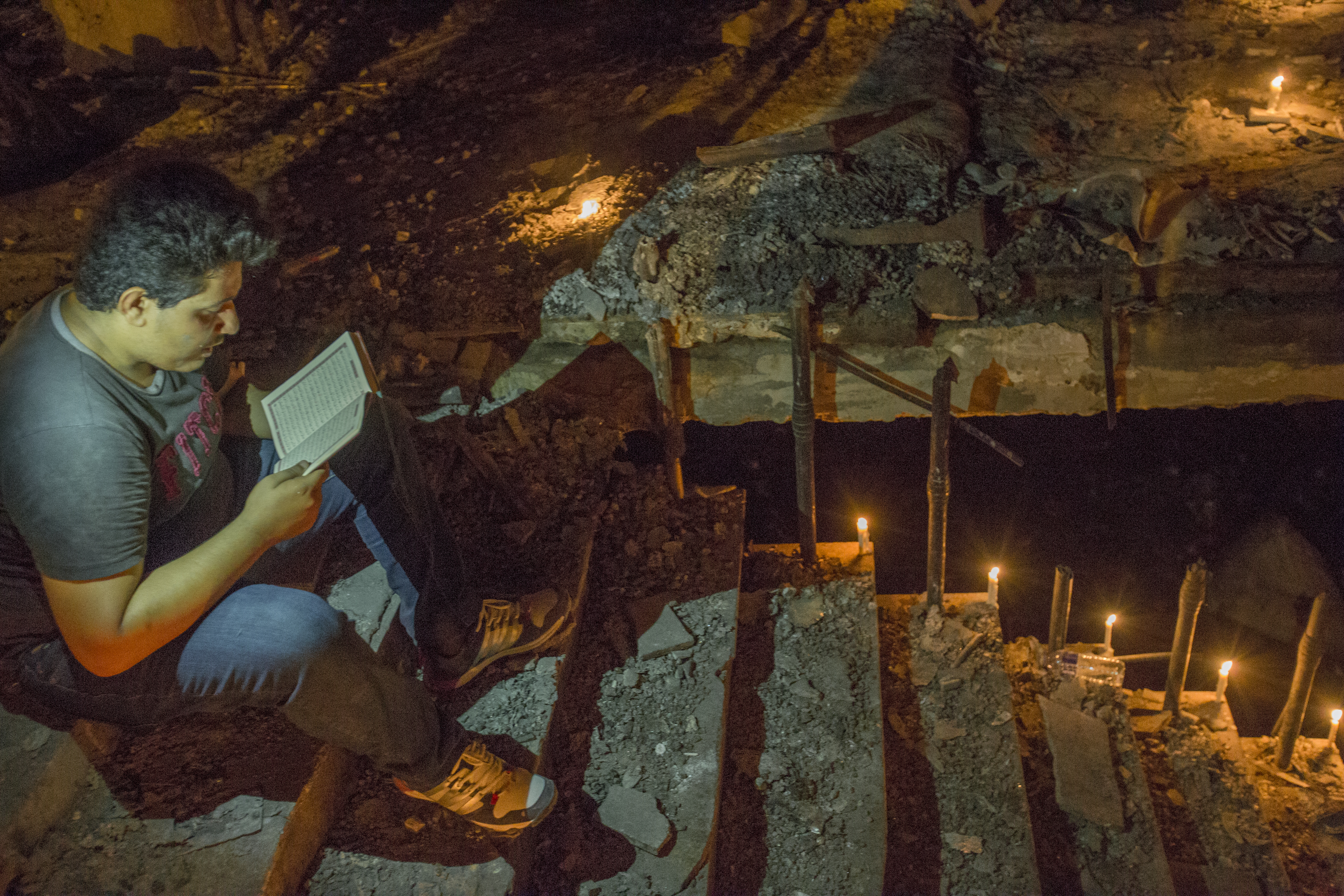 مجمع هادي سنتر " تفجير الكرادة" في بغداد 2016